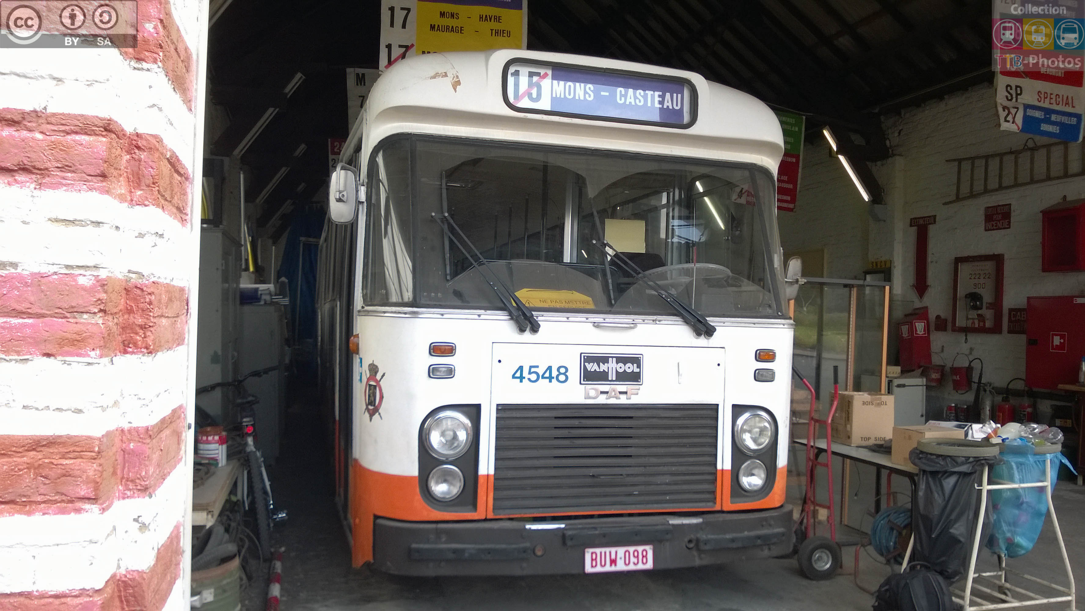 TEC Hainaut 4548 - ligne 15b vers Casteau Casteau, dépôt TEC - 14 juin 2014 Van Hool AI 119/2 DAF DKDL1160 ex-SNCV 4447(01/1976)